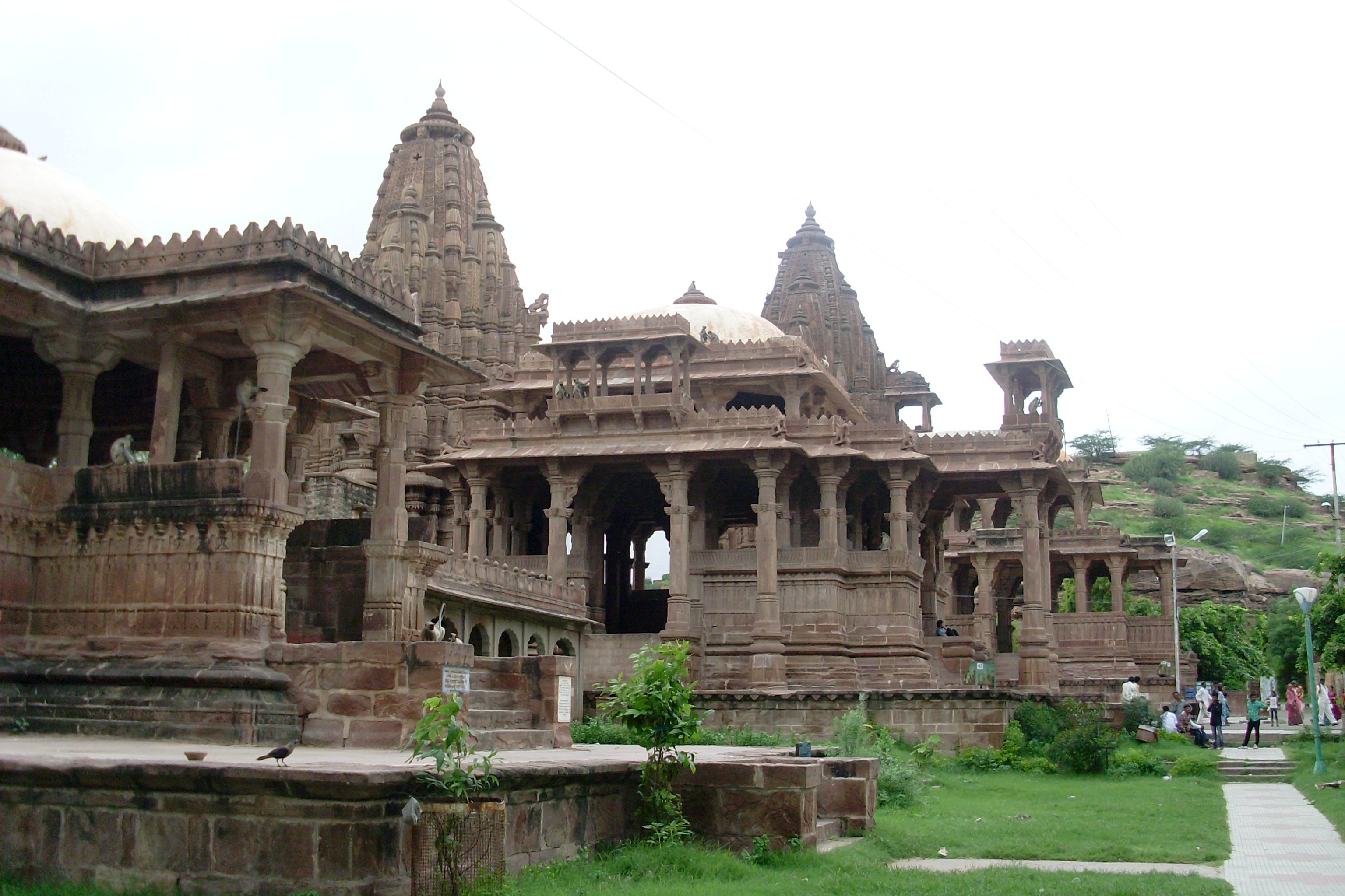 Les cénotaphes de Mandore, près de Jodhpur, Rajasthan, Inde